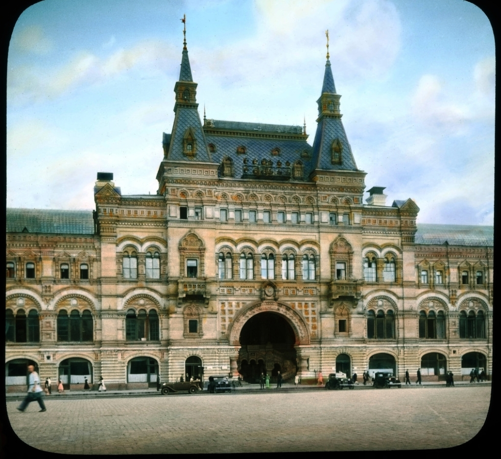 Москва. ГУМ